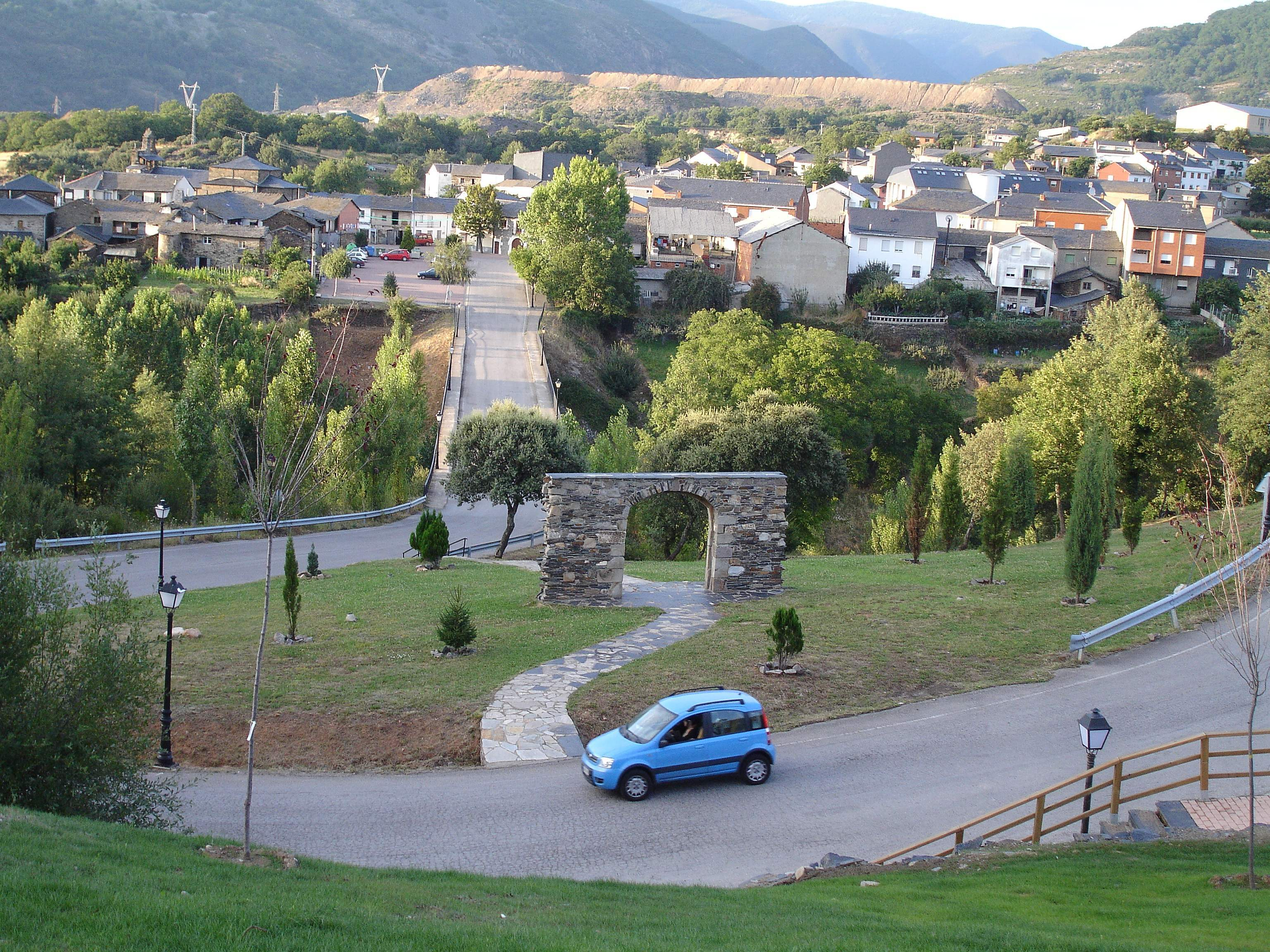 Vista de Páramo del Sil - Barrio de la Villa.